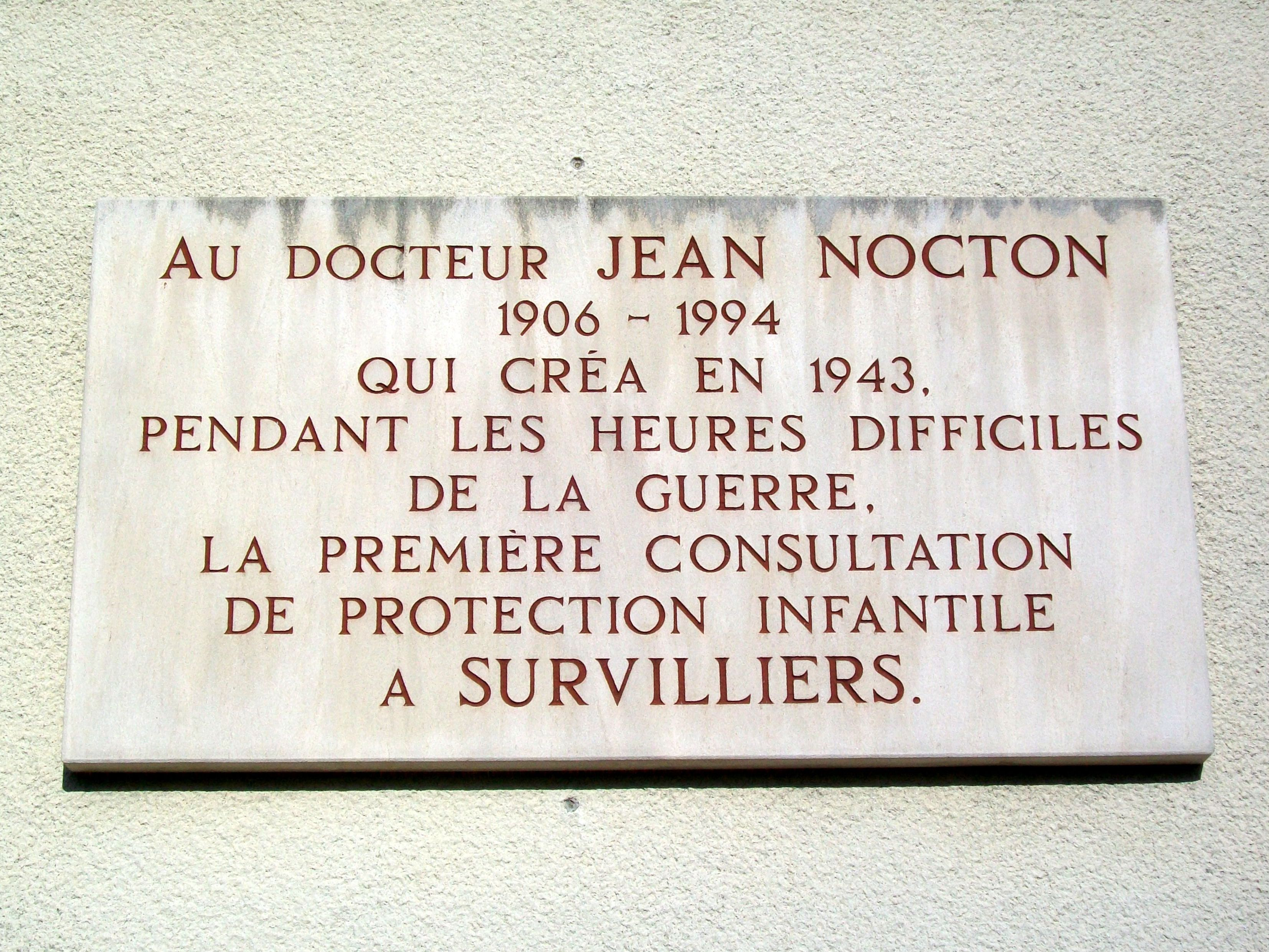 Plaque commémorative sur l'immeuble de la PMI, dédiée à son fondateur.